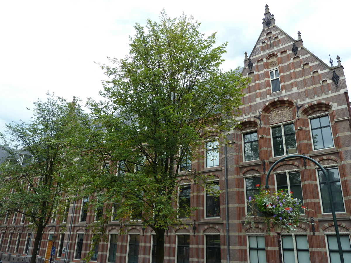 Amsterdam Oostindien Huis